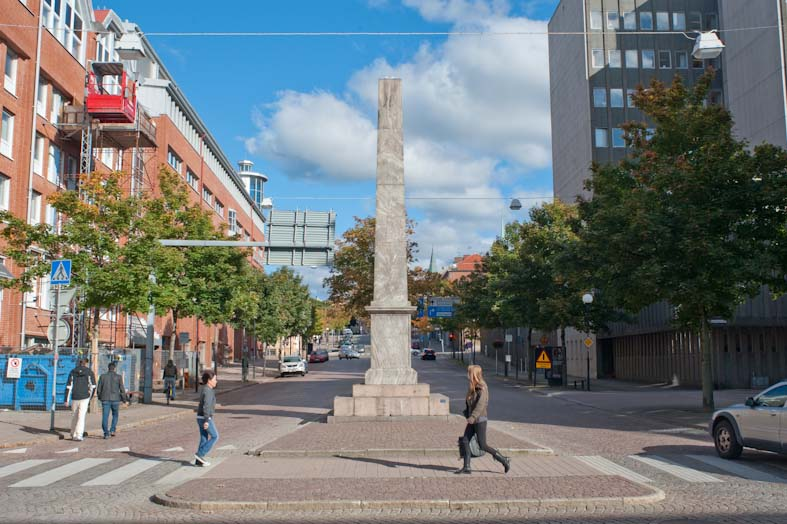 Korsningen Allégatan och Yxhammarsgatan. Återfotografering av bild nr DB0480 från 1944. Motiv: Borås Nyckelord: Riksintressen Kategori: StadsmiljöKorsningen Allégatan och Yxhammarsgatan. Återfotografering av bild nr DB0480 från 1944.